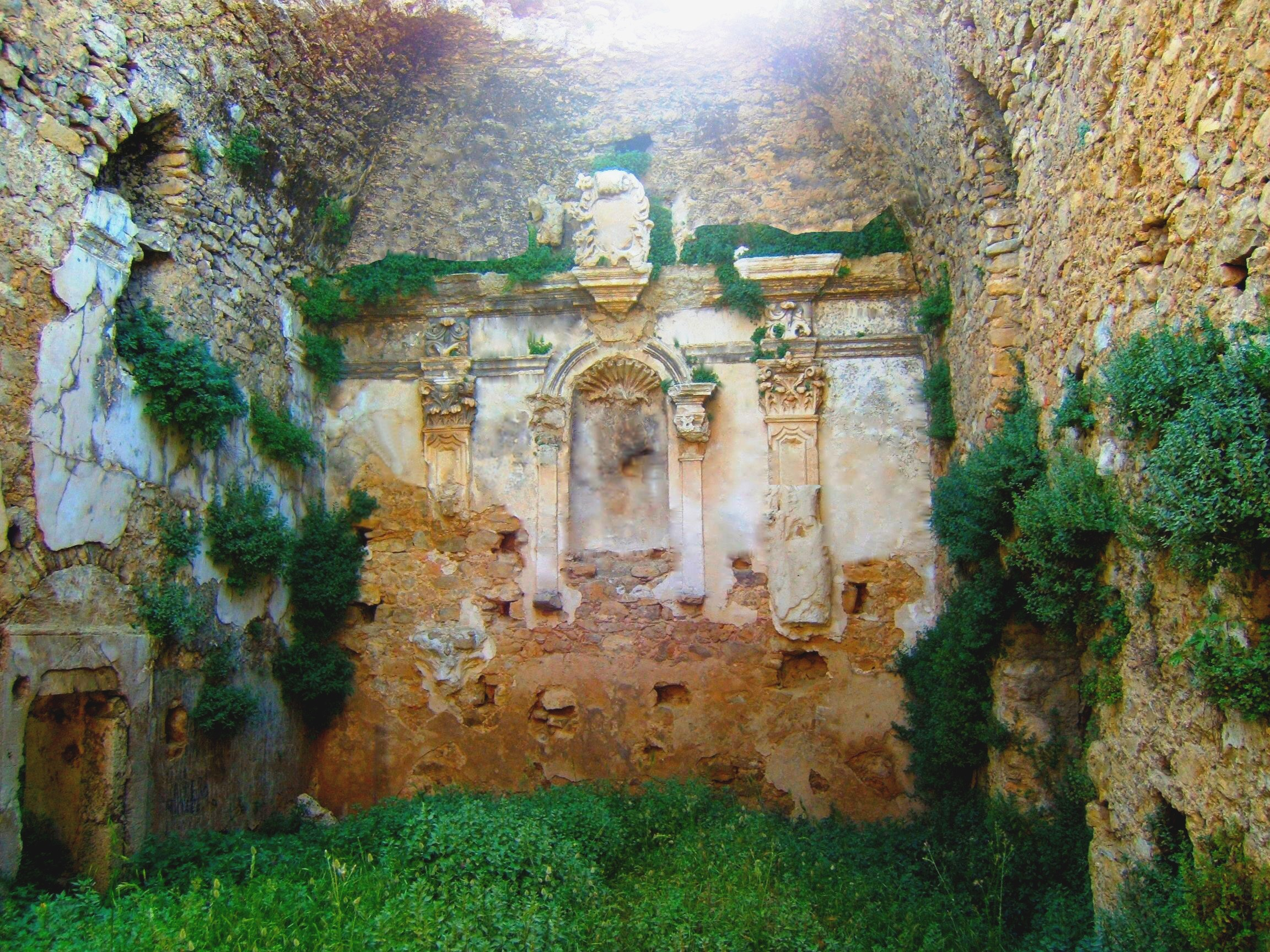 Foto di Carmelo Parrinelli Licensing Categoria:Immagini esclusivamente in GNU FDL